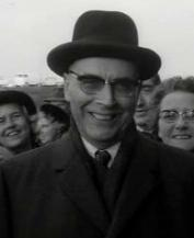 G. van Hall (1904-1977)